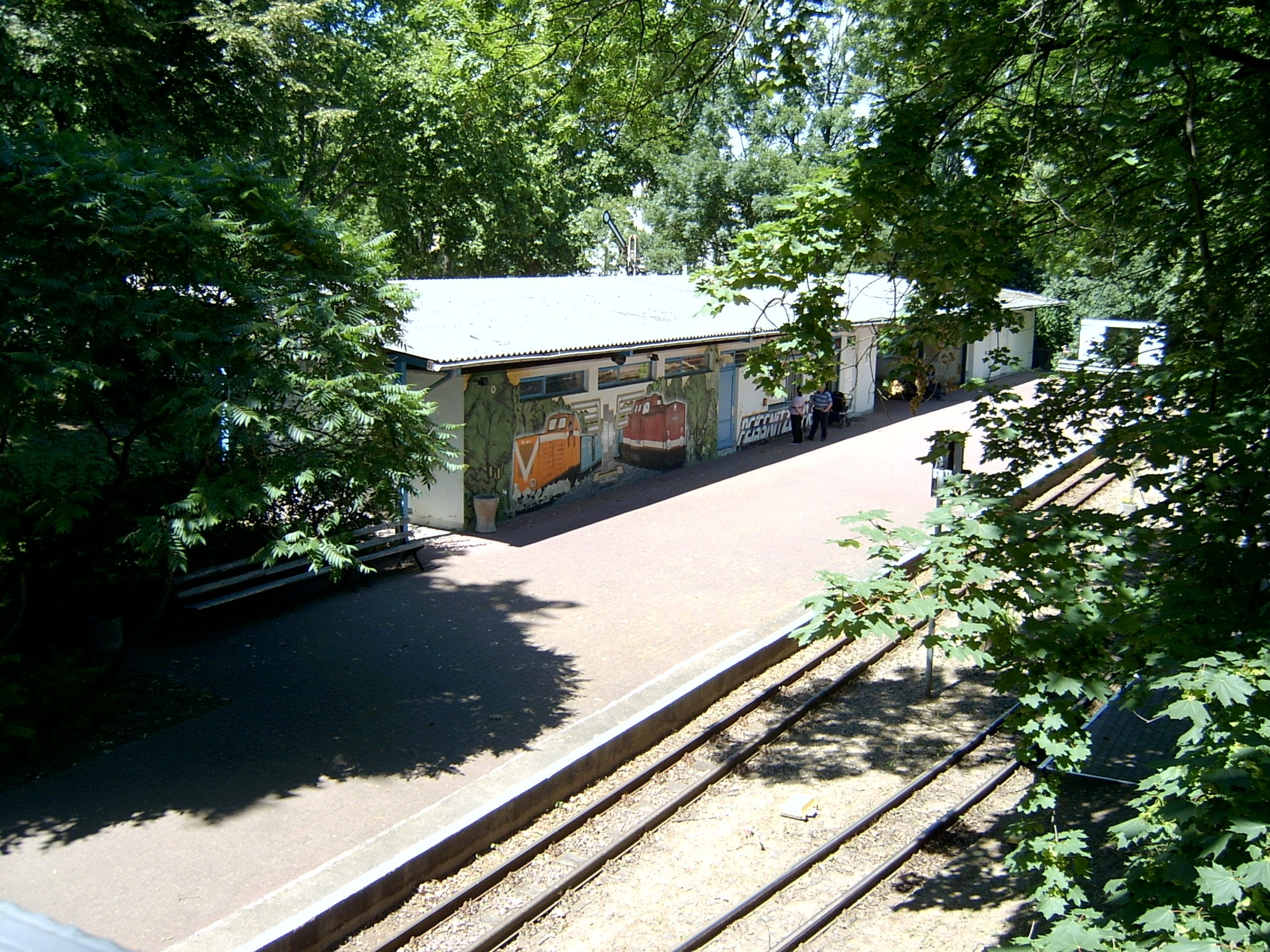 Bahnhof der Parkeisenbahn auf der Peißnitz in Halle (Saale).